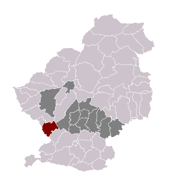 Férin dans son canton et son arrondissement